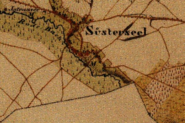 Preußische Kartenaufnahme 1846 - Uraufnahme